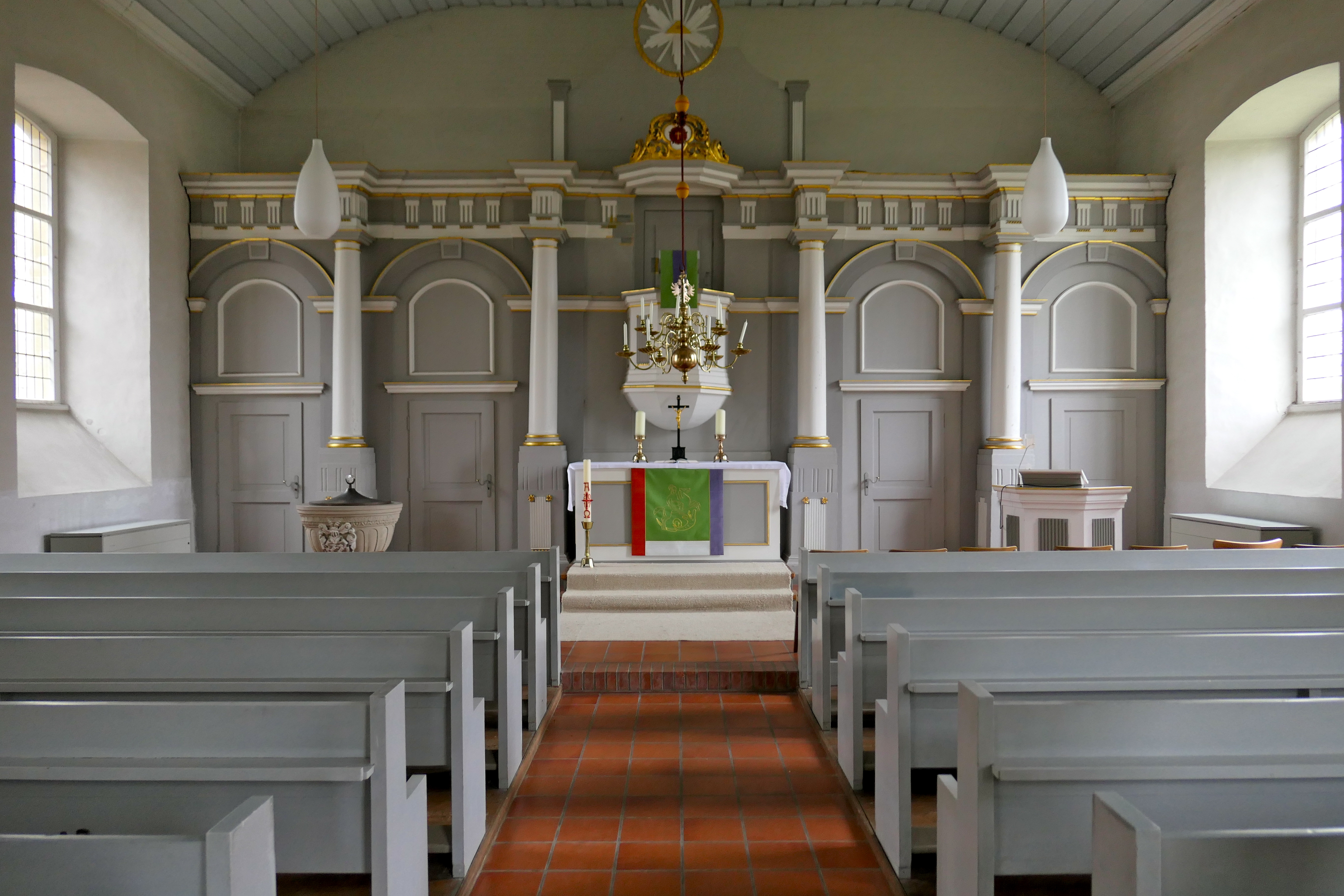 Das Innere der Kapelle St. Georg (Bad Salzdetfurth-Listringen) mit ihrem Kanzelaltar